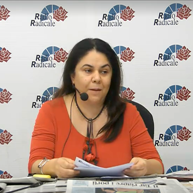 Michela Murgia durante la puntata del 15/08/2019 della trasmissione di rassegna stampa di Radio Radicale "Stampa e regime"